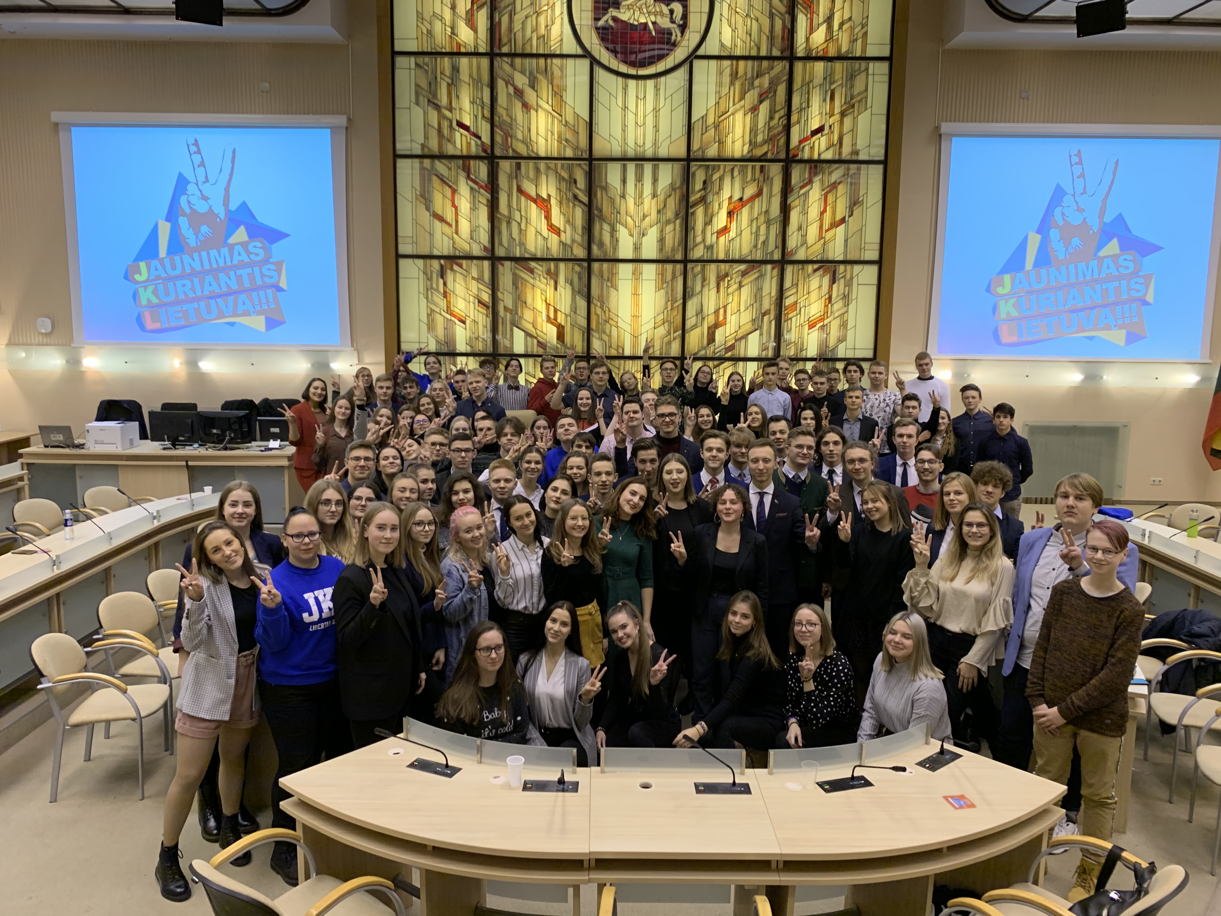 JKL Žiemos konferencija 2019